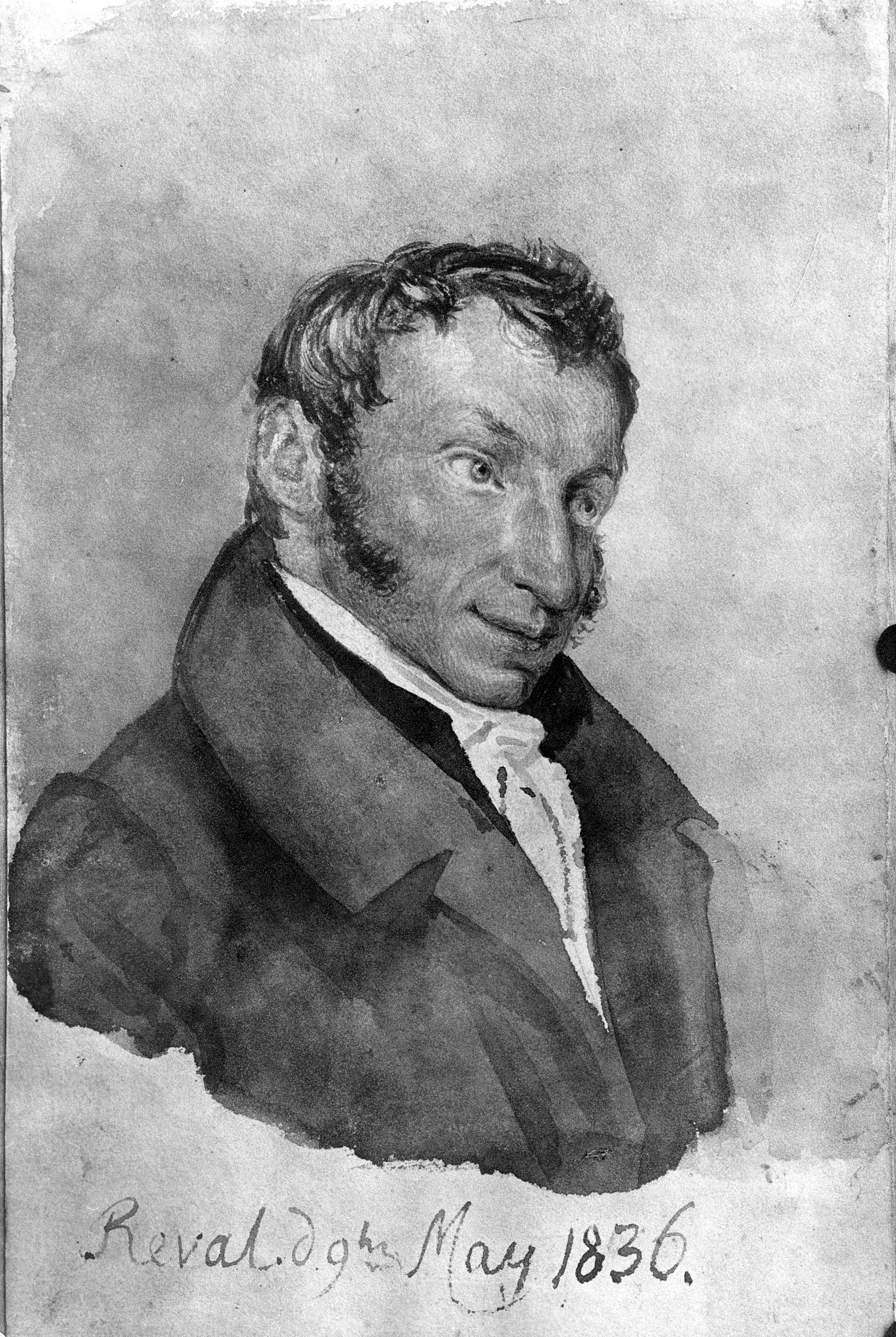 Porträt (Aquarell) von Julius von Paucker